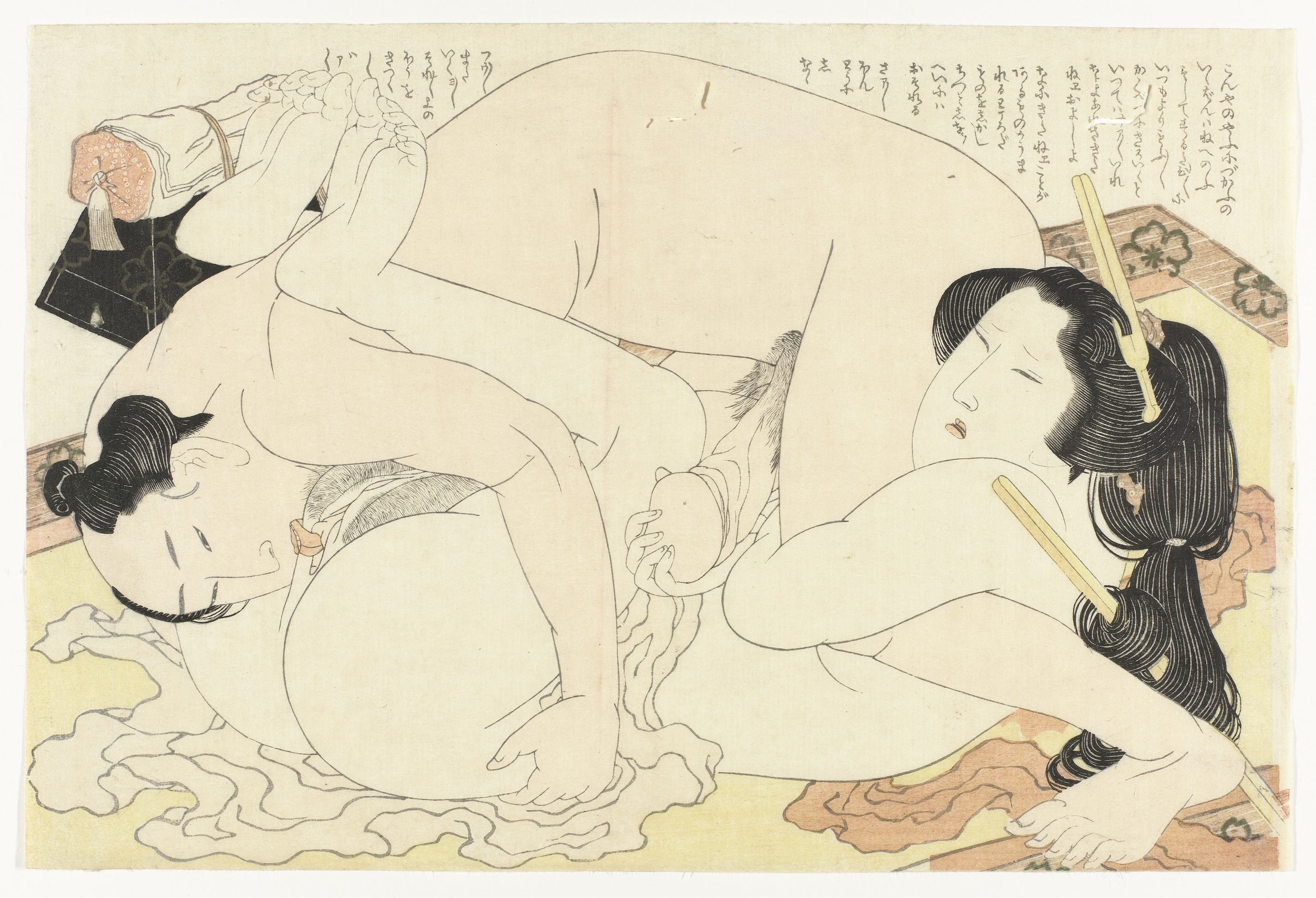 Naakte man en getrouwde vrouw, herkenbaar aan de zwarte tanden, de liefde bedrijvend op geel vloerkleed; op de achtergrond een hoofdkussen. Label Line: mentioned on object Katsushika Hokusai (12-okt-1760 - 10-mei-1849), 1815 - 1823, kleurenhoutsnede; lijnblok in zwart met kleurblokken en blinddruk Collection: prenten; Japan (collectie)